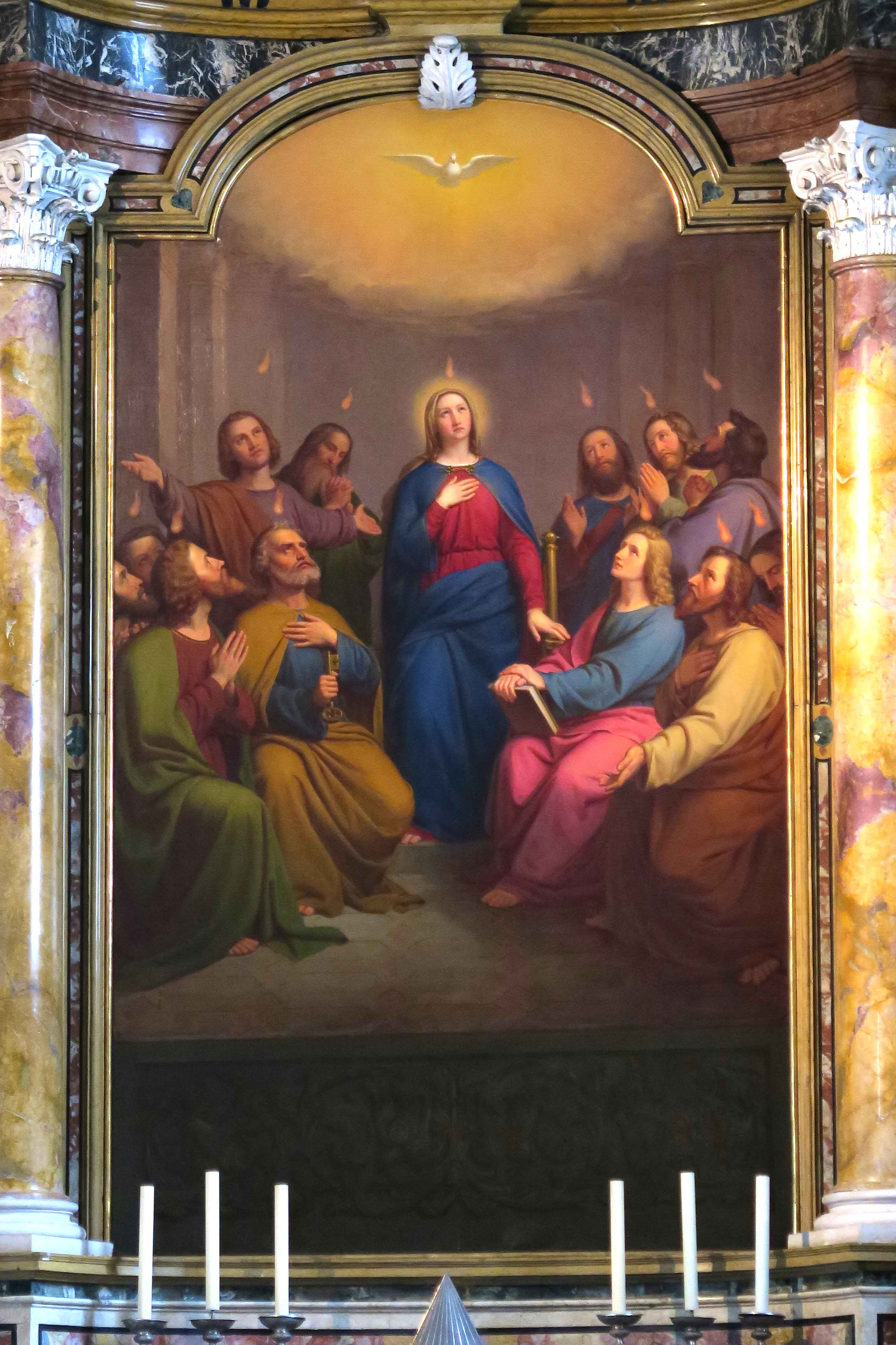 Heiliggeist-Szenen-Bild am Hochaltar, Maria umgeben von den 12 Apostelne, totale, Gemälde von Kaspar Jele (1848), Hochformat